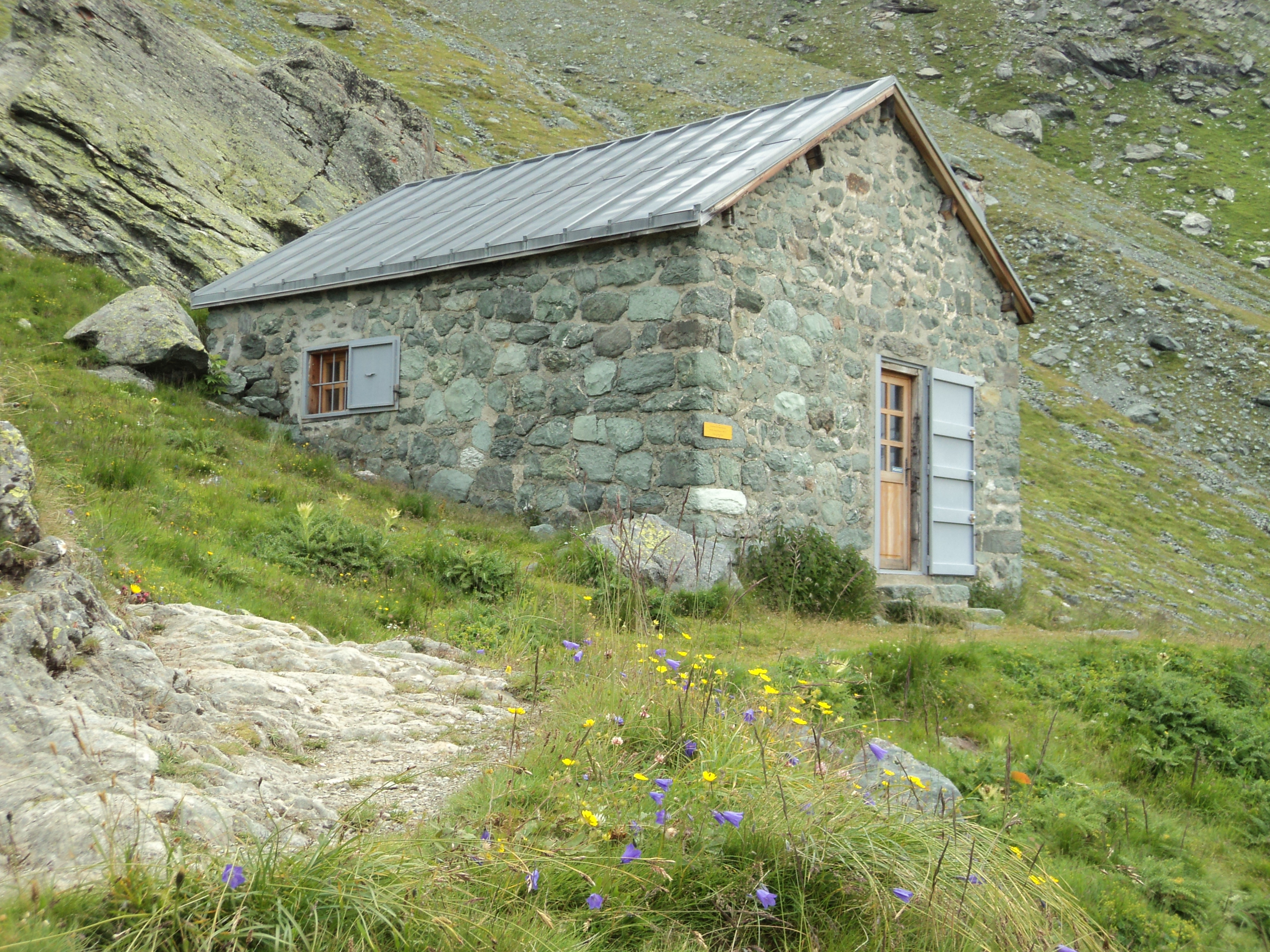 L'antico Refuge Reagaud, ora trasformato in museo, e situato nei pressi del refuge du mont Pourri